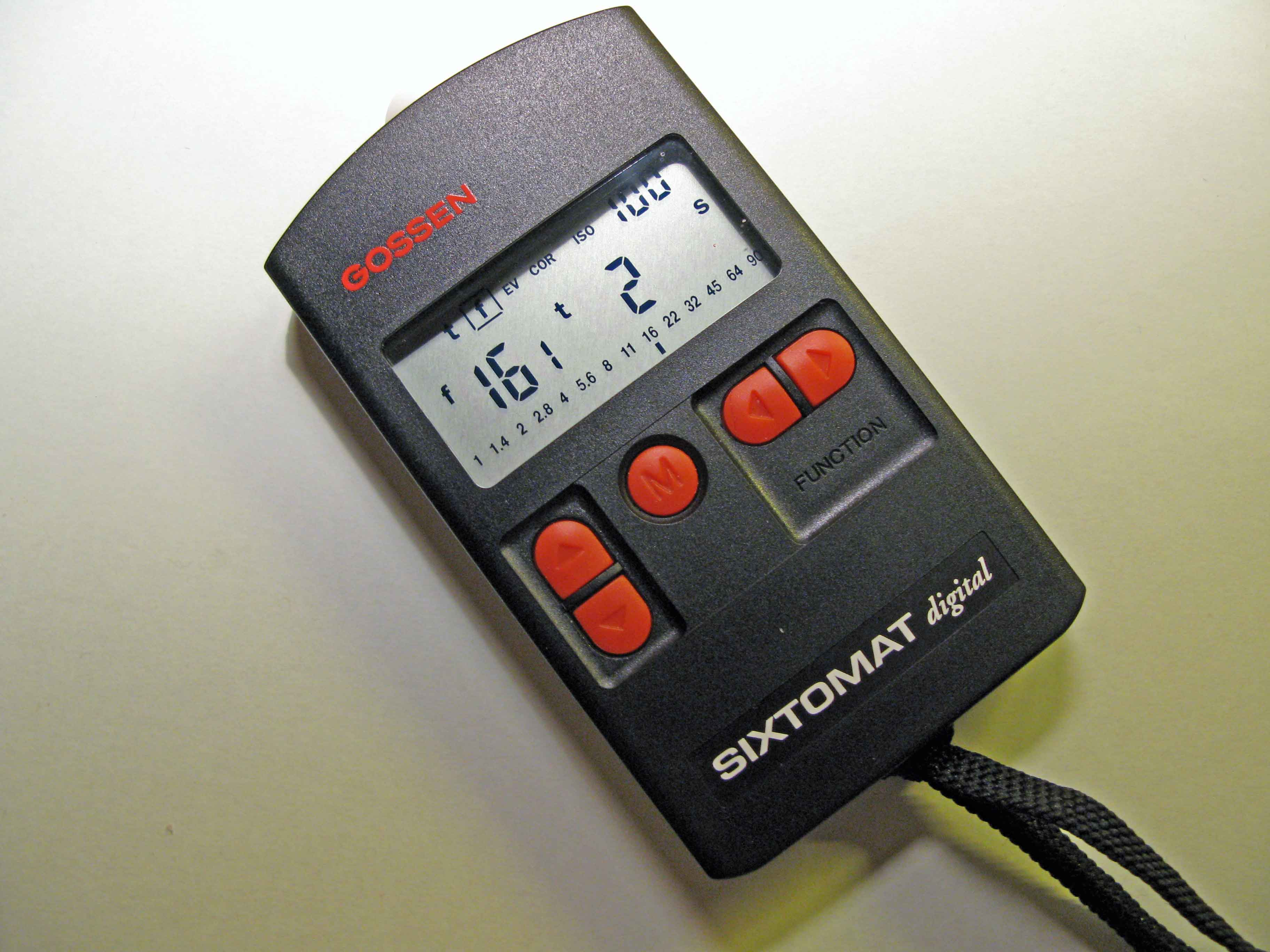 Handbeliichtungsmiesser.